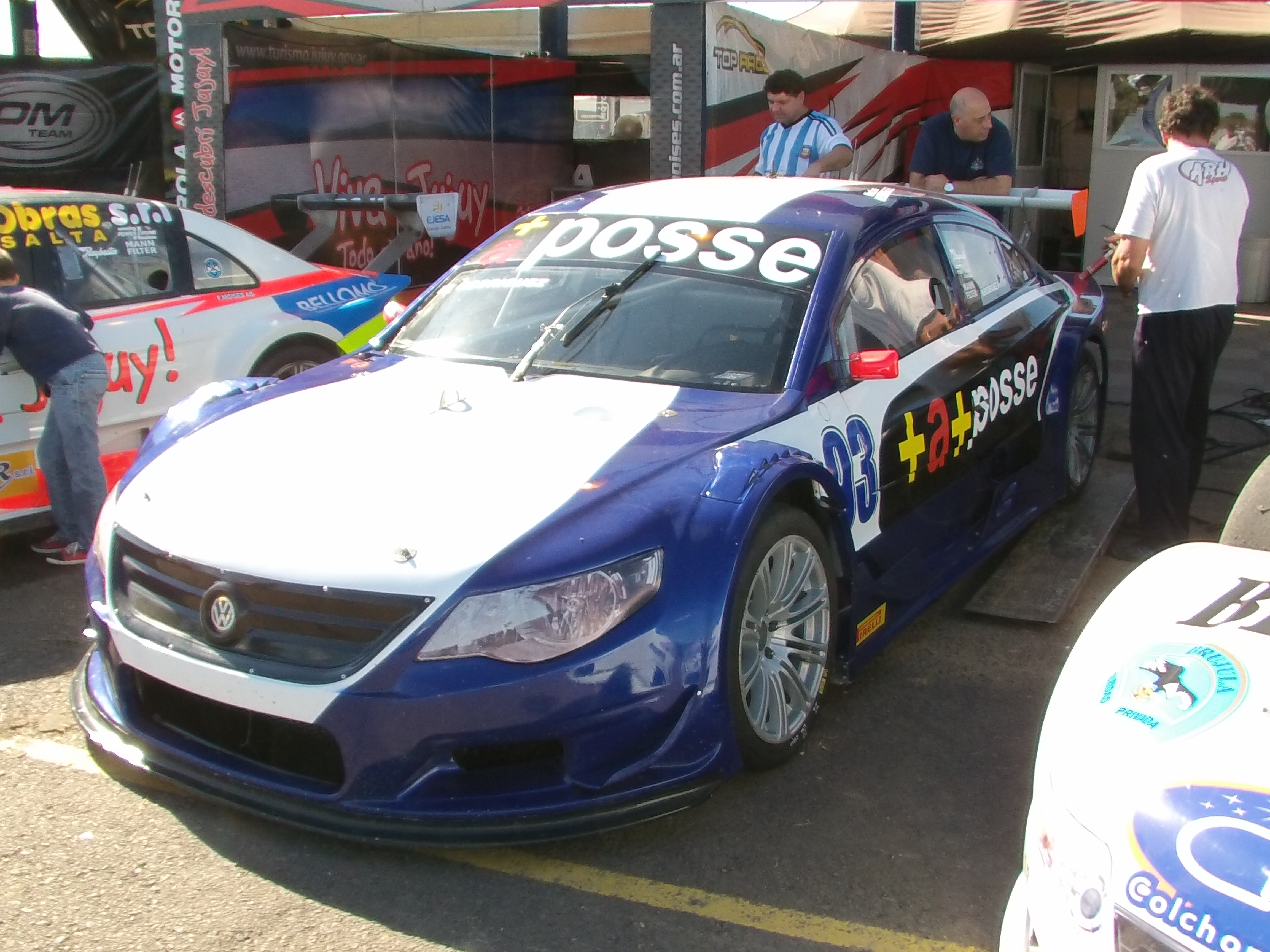 Unidad Volkswagen Passat CC del equipo ABH Sport de Top Race V6